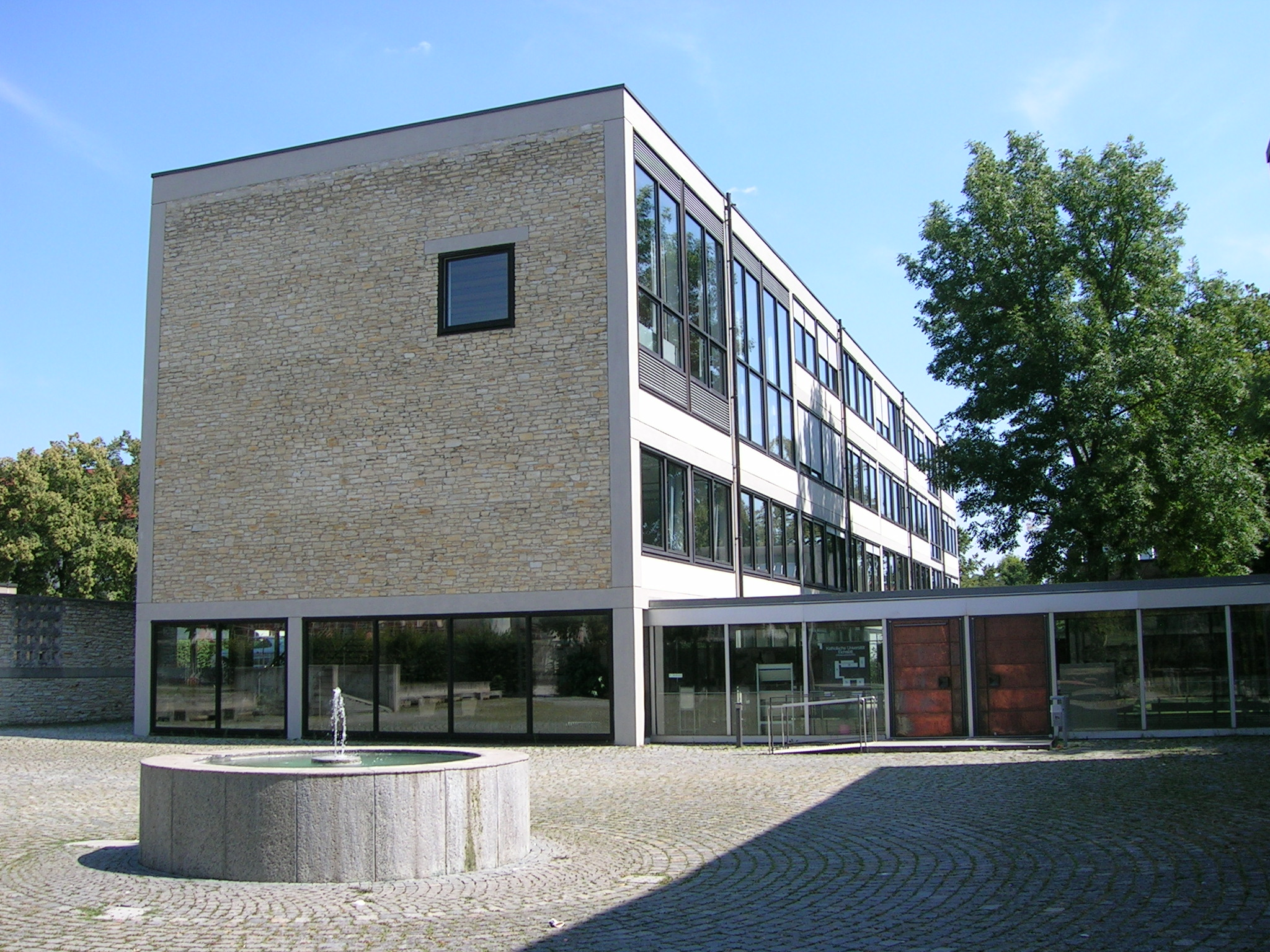 Ostenstraße 28 Eichstätt: Kollegiengebäude der Katholischen Universität Eichstätt-Ingolstadt.